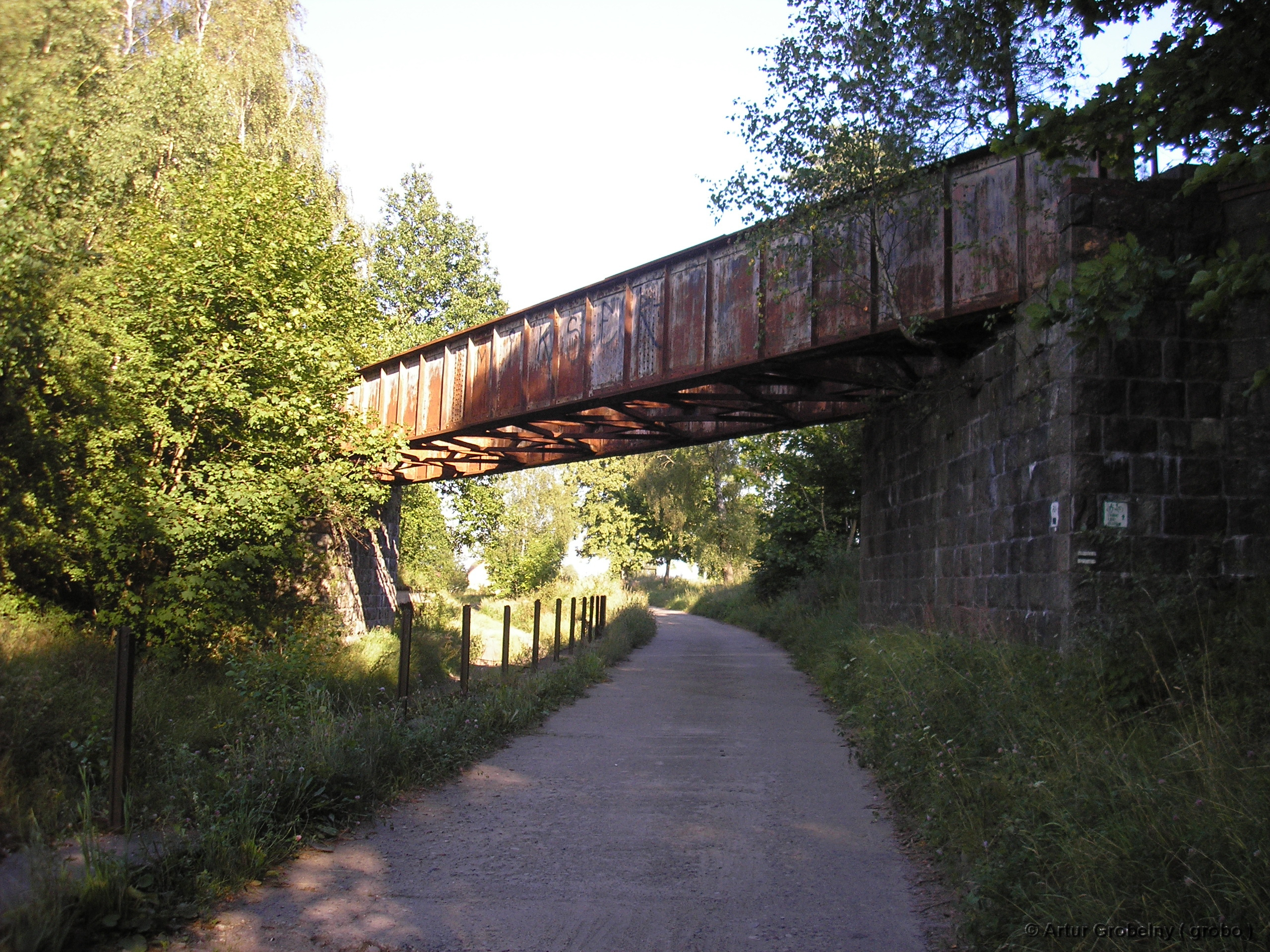 Wiadukt kolejowy Polanów, Polska, województwo zachodniopomorskie, powiat koszaliński, gmina Polanów, ulica Zacisze